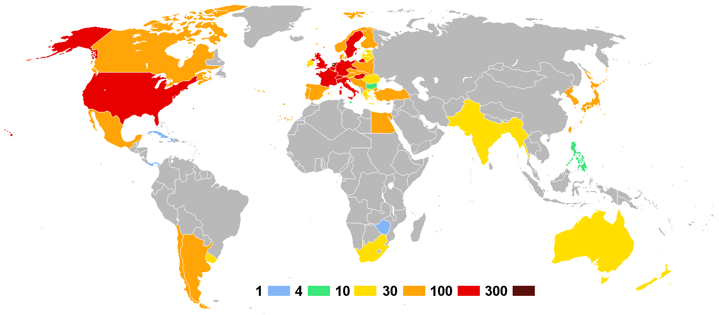 Olympische Sommerspiele 1928 — Anzahl der Athleten